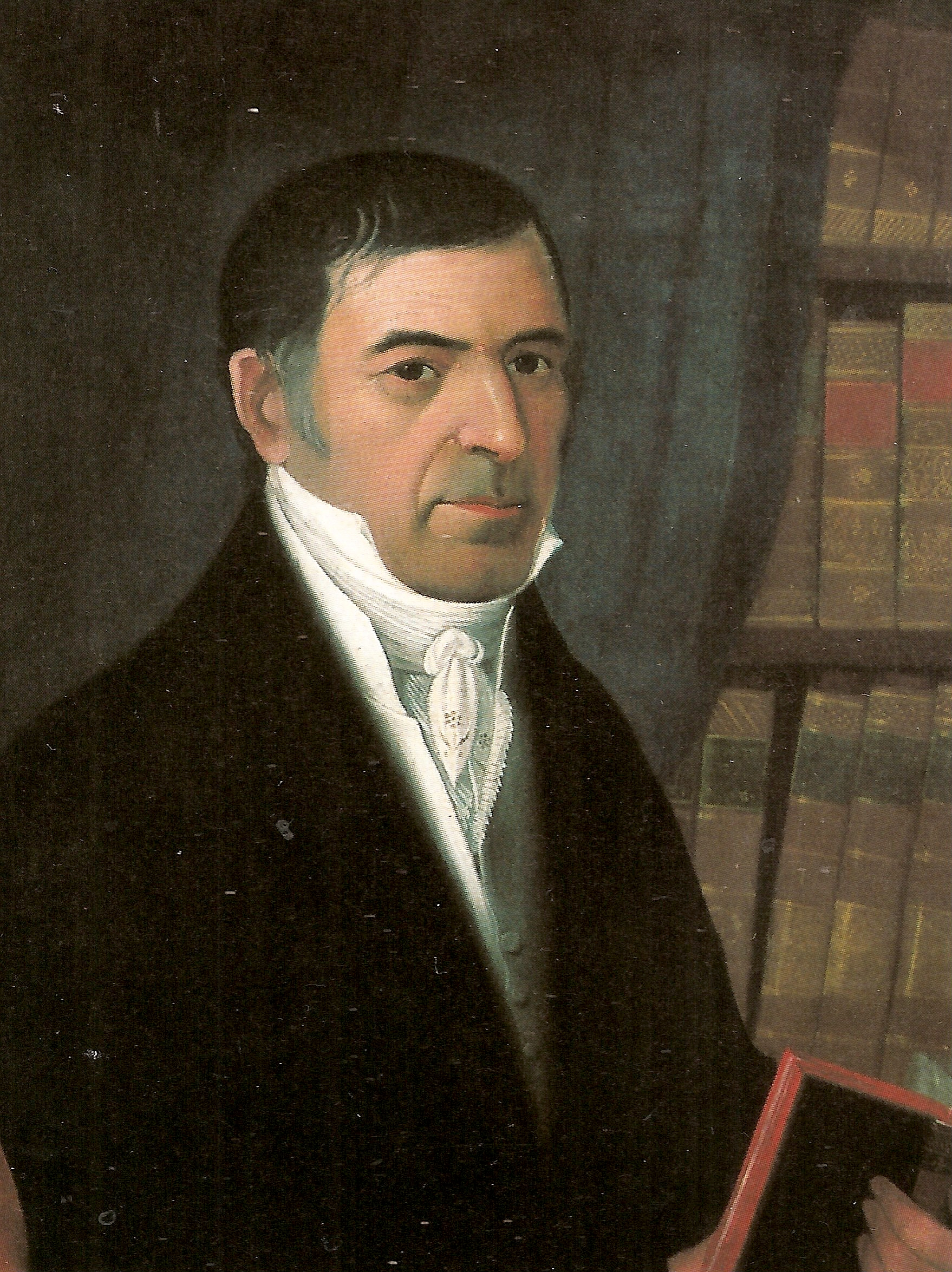 Juan Lovera (1776-1841): Retrato de Cristóbal Mendoza 1825, Oleo sobre tela, Palacio Municpal de Caracas